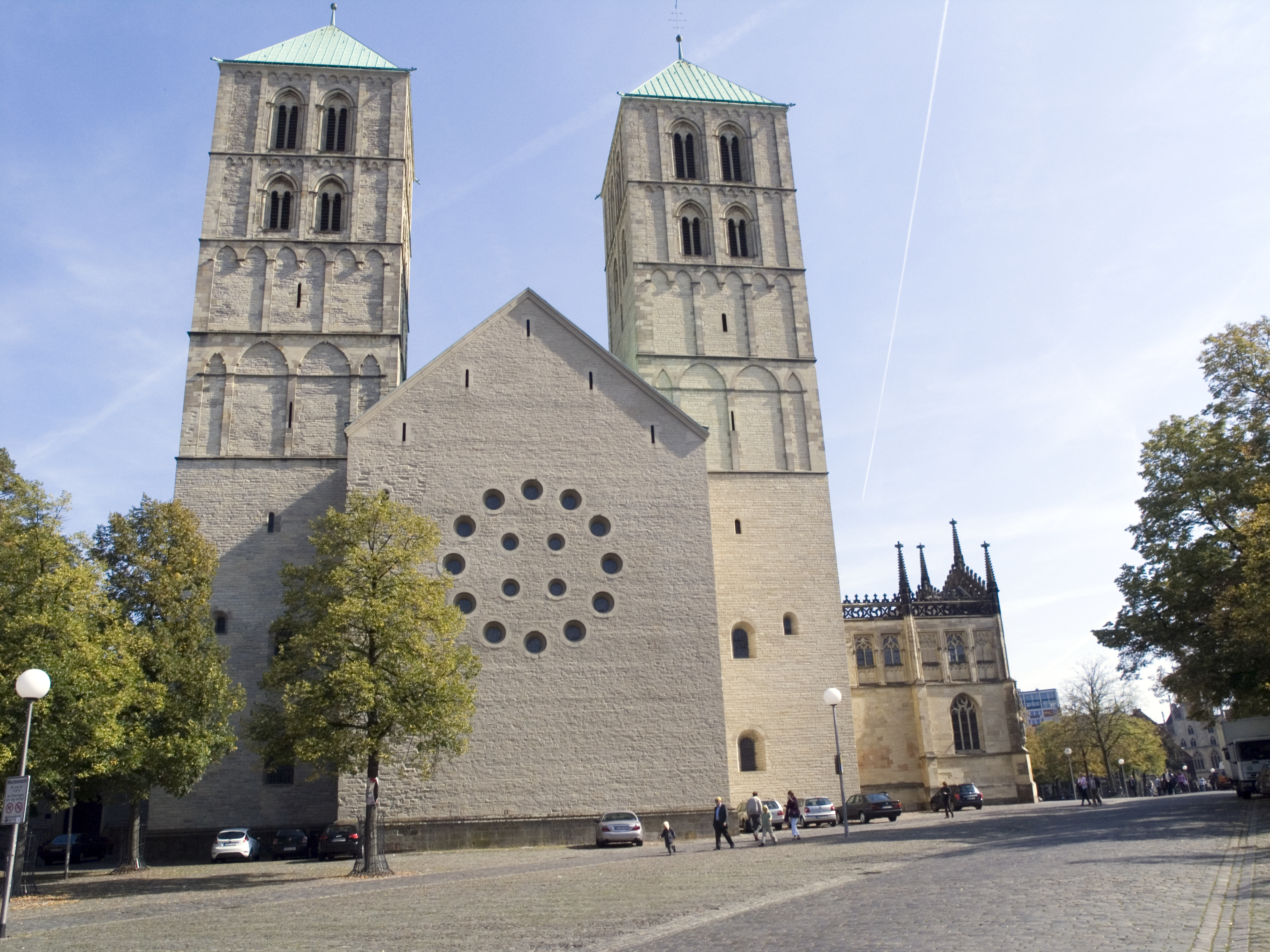 Северный Рейн - Вестфалия, Мюнстер - собор Святого Павла